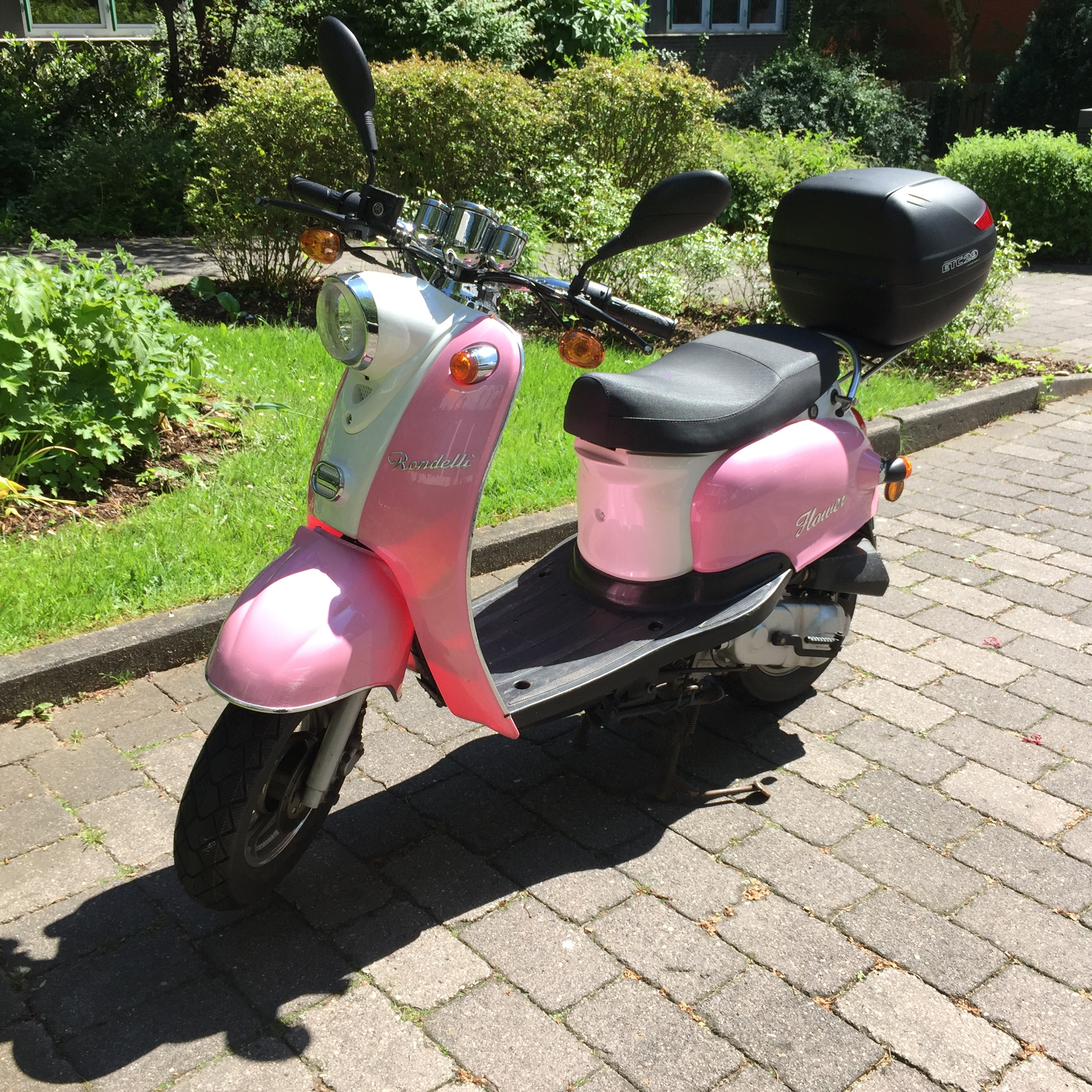 Rondelli "Flower" Motorroller